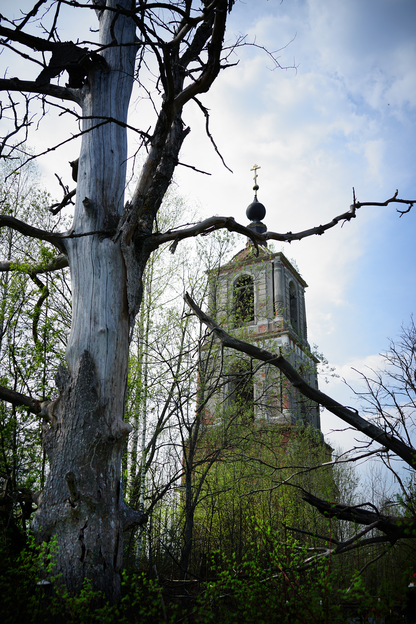 Колокольня. Аргуновский Никольский храм (Урочище Аргуново). Россия. Владимирская область.